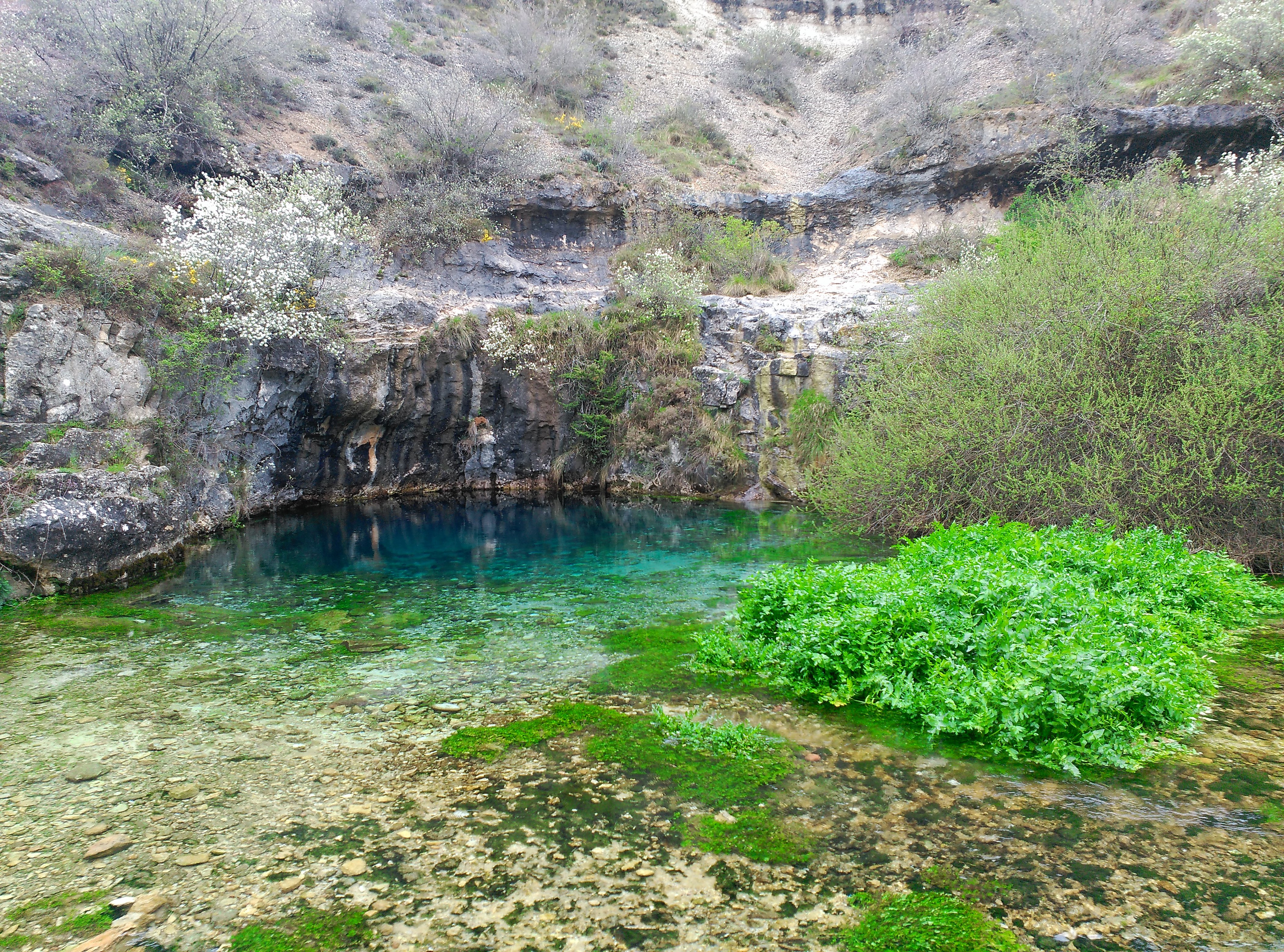 Hoces del Alto Ebro y Rudrón This is a photography of a Special Area of Conservation in Spain with the ID: ES4120089. Natura2000 entry, EEA entry